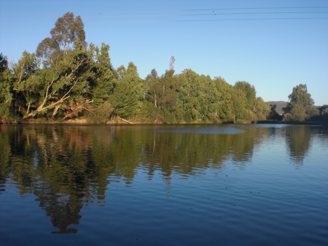 Rivero Bullaque